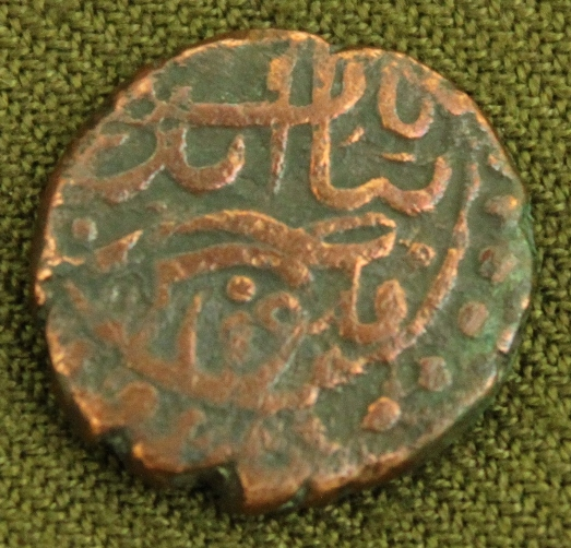 Карабахское ханство Панахабад. (Шуша).